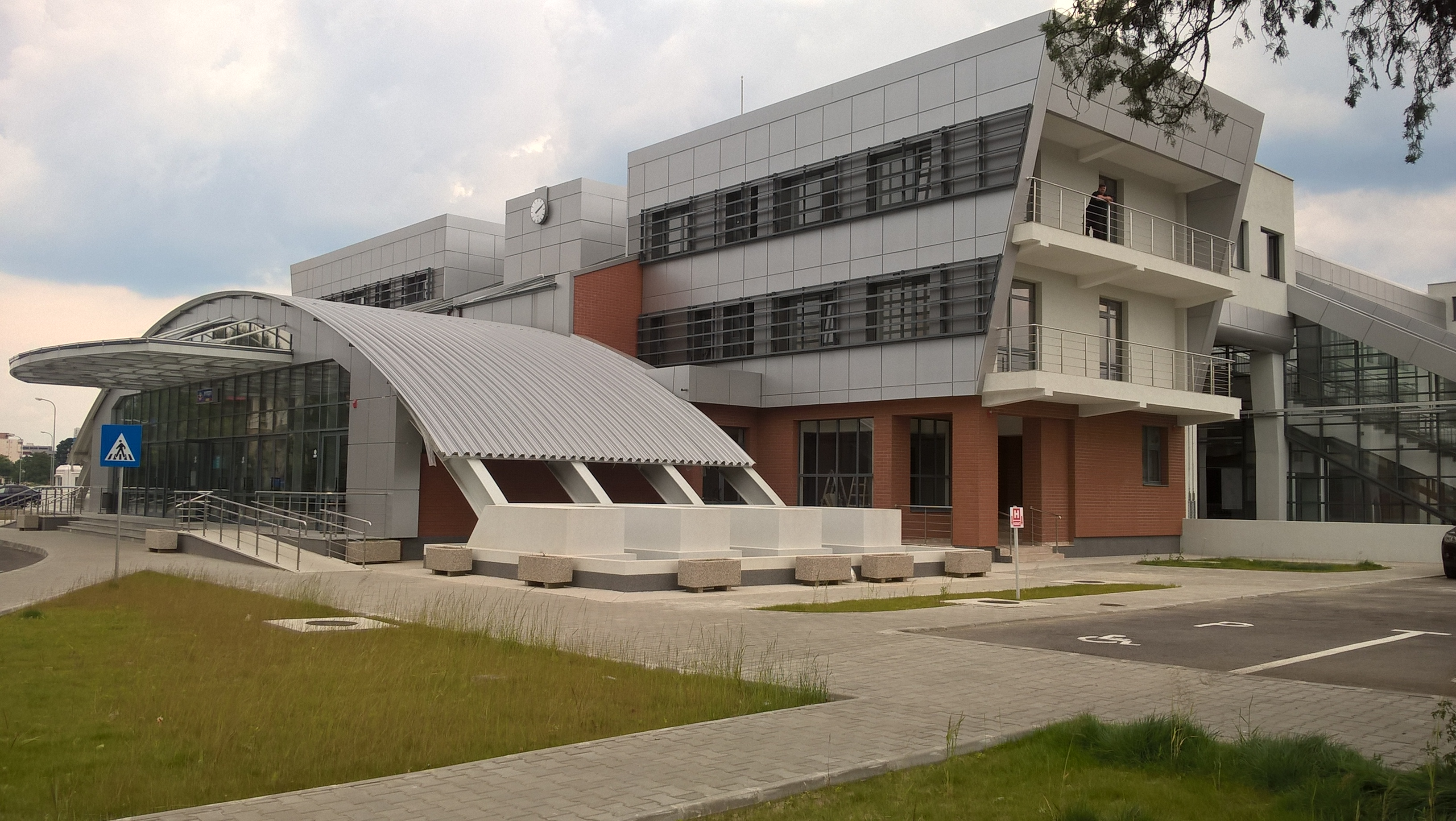 Fațada principala Bd. Republicii